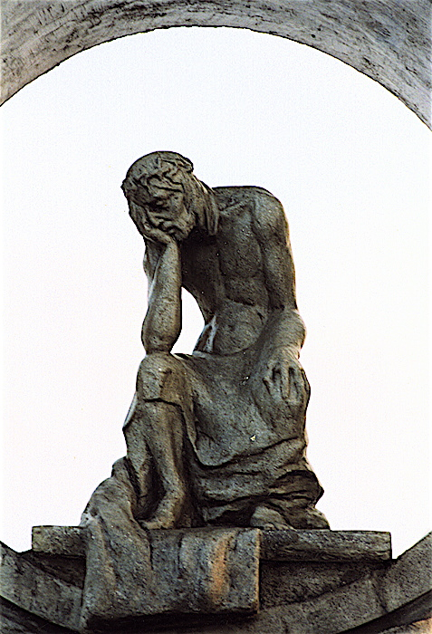 Rzezba Chrystus Frasobliwy. Kapliczka przydrozna w Kurowicach